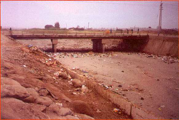 Río ICA, cruce con la Ruta Panamericana, aguas abajo de la ciudad. ICA. Perú, 2000. Autor: Alfredobi